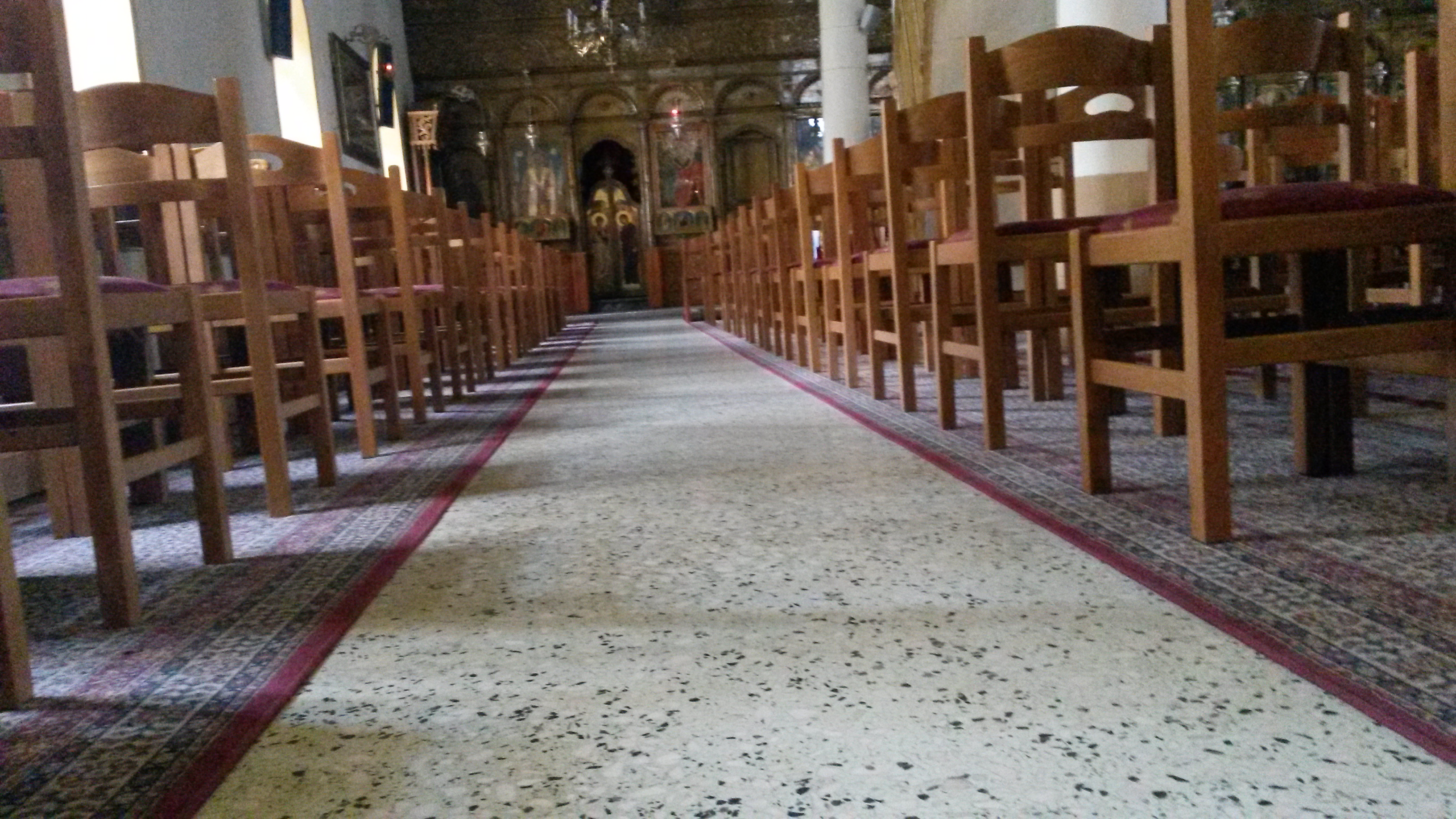 Εσωτερική όψη των θέσεων της Εκκλησίας.